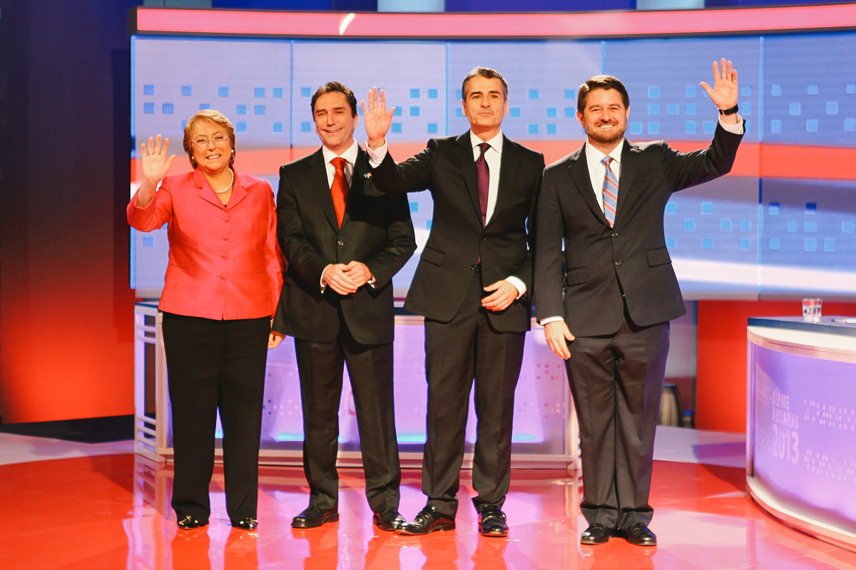 Michelle Bachelet, José Antonio Gómez, Andrés Velasco y Claudio Orrego en la previa del Debate realizado por CNN Chile y Canal 13 para las primarias presidenciales de la Nueva Mayoría, 2013.